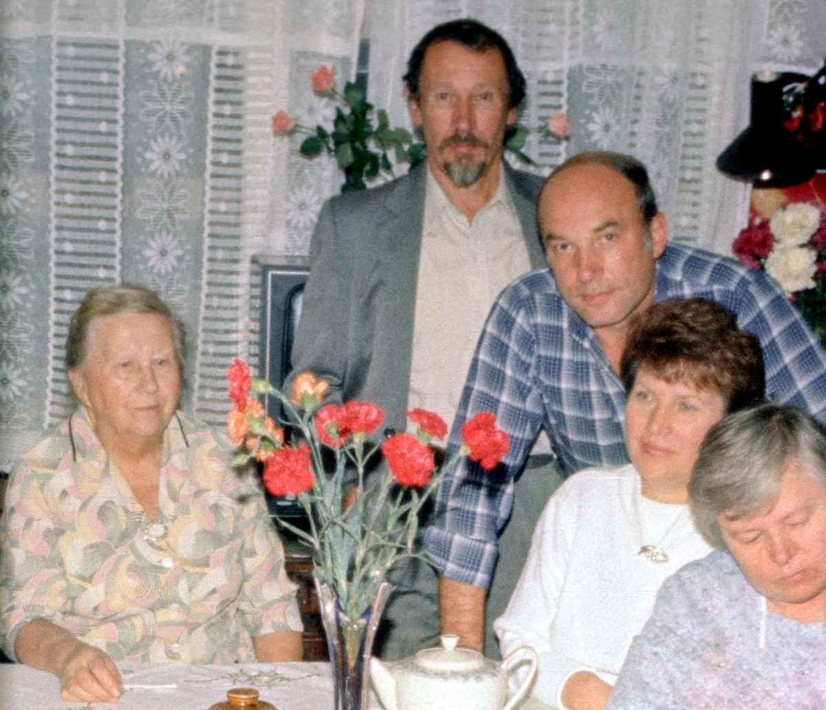 Второва Елизавета Фёдоровна, Бондарев Лев Георгиевич, Злотин Роман Исаевич, Лисовенко Екатерина Андреевна (1938-2017), Бондарева Валентина Яковлевна.